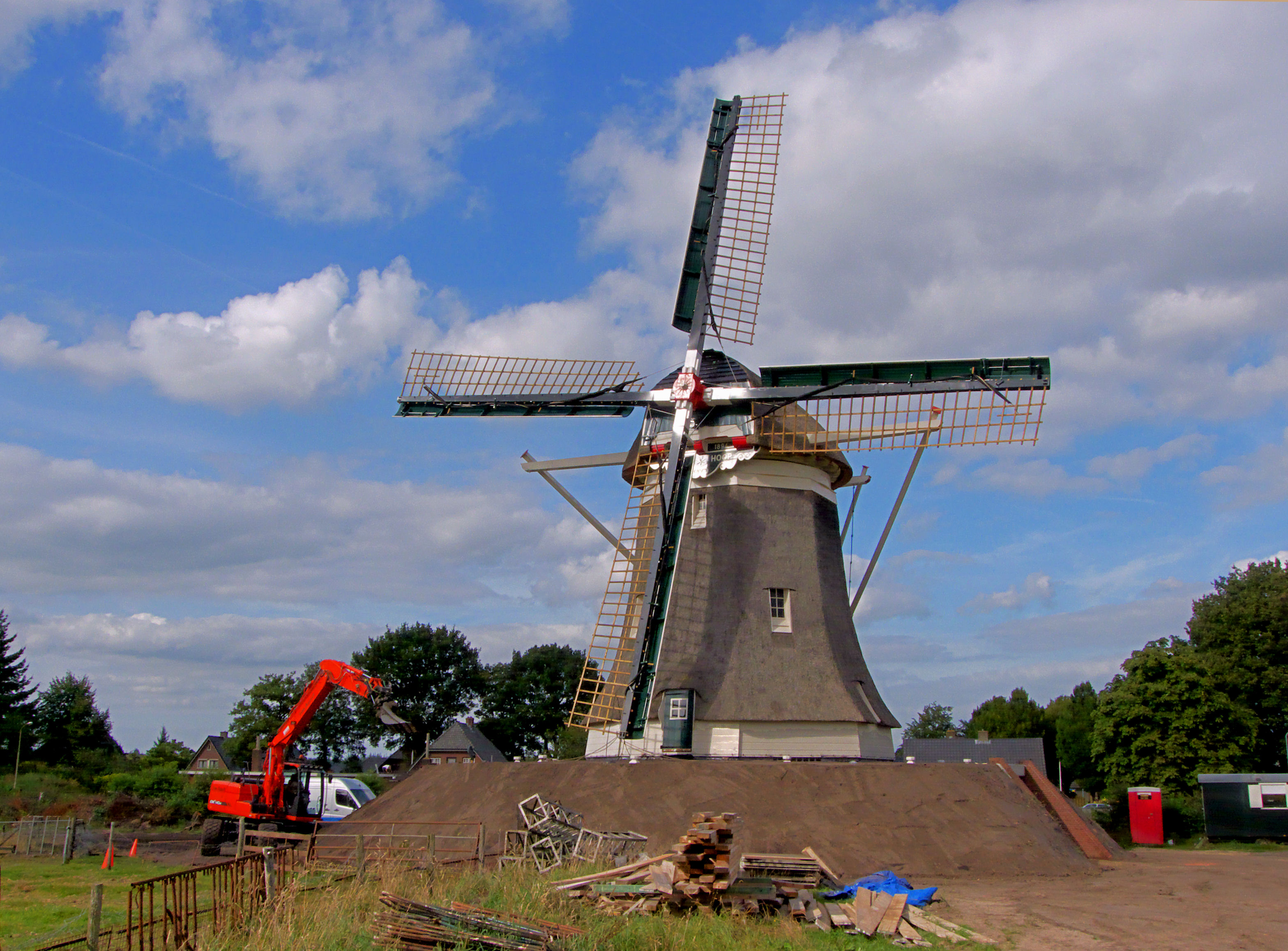 Molen De Hoop, Elspeet